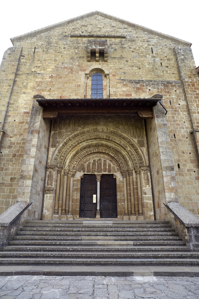 unidentified Spain